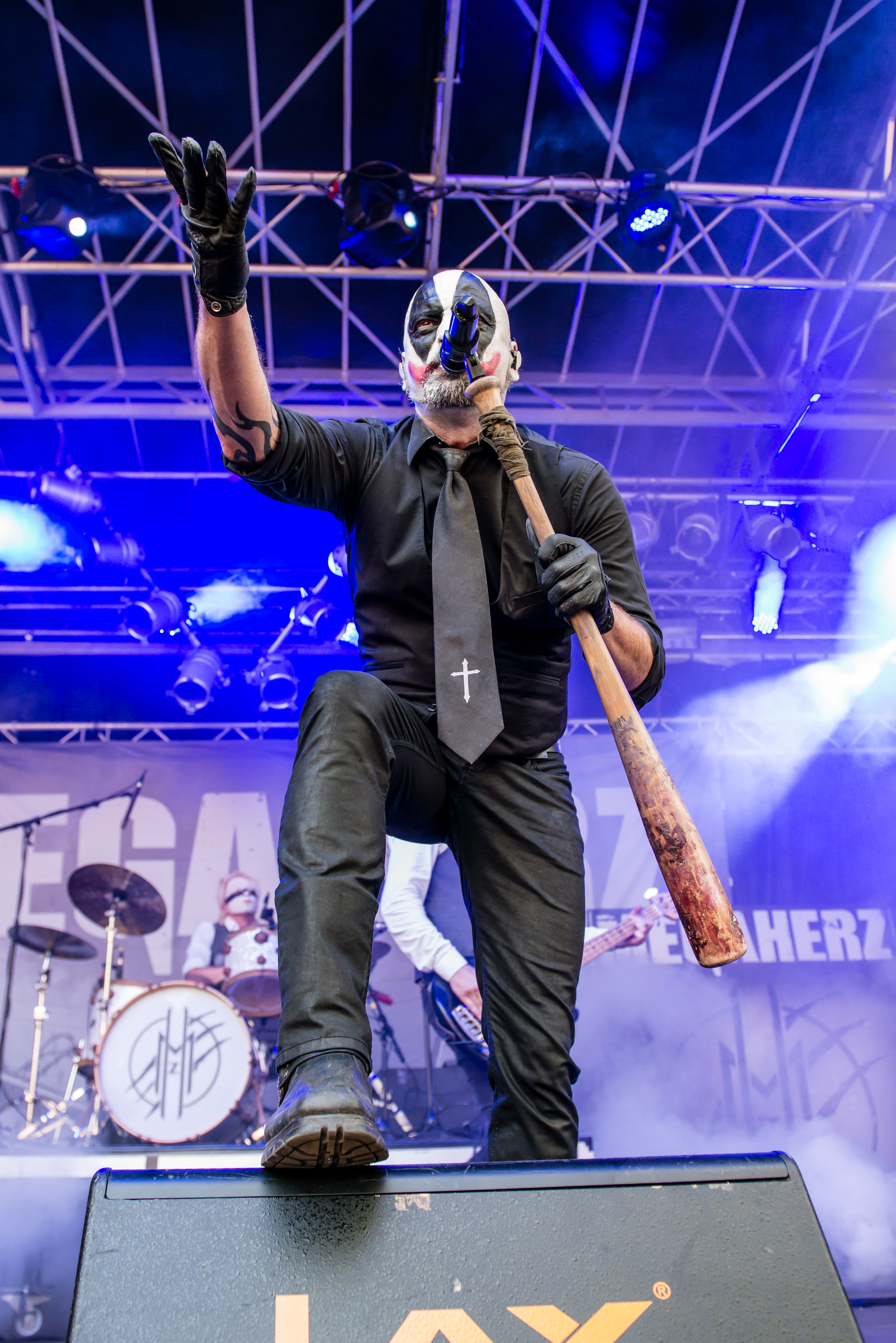 'Castle Rock 2015; Mülheim Schloß Broich': 'Megaherz'